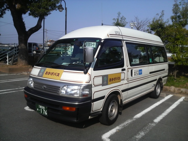 伊勢市コミュニティバス（おかげバス、トヨタ・ハイエースタイプ）の写真